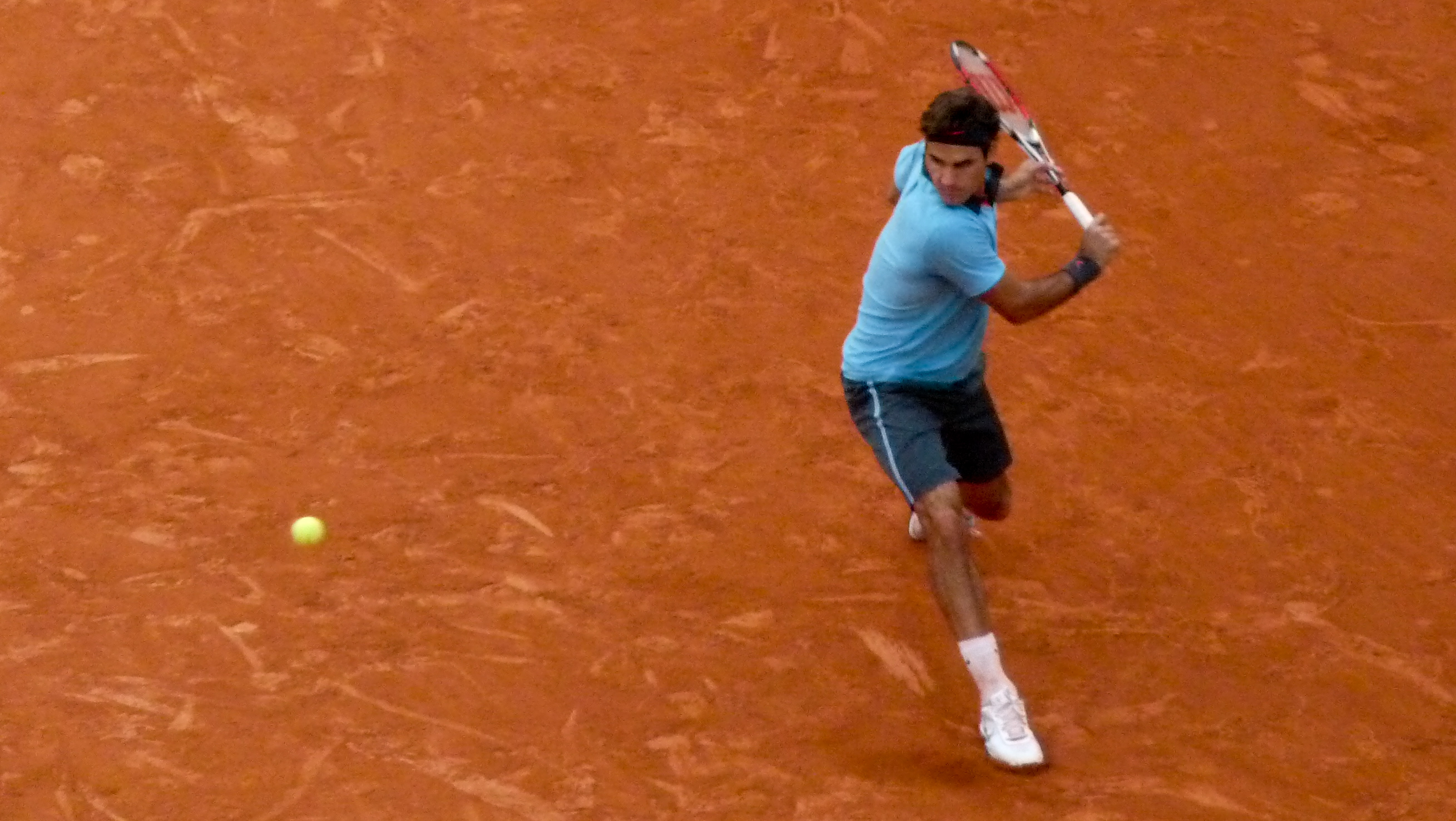 Roger Federer against Juan Martín del Potro in the 2009 French Open semifinals